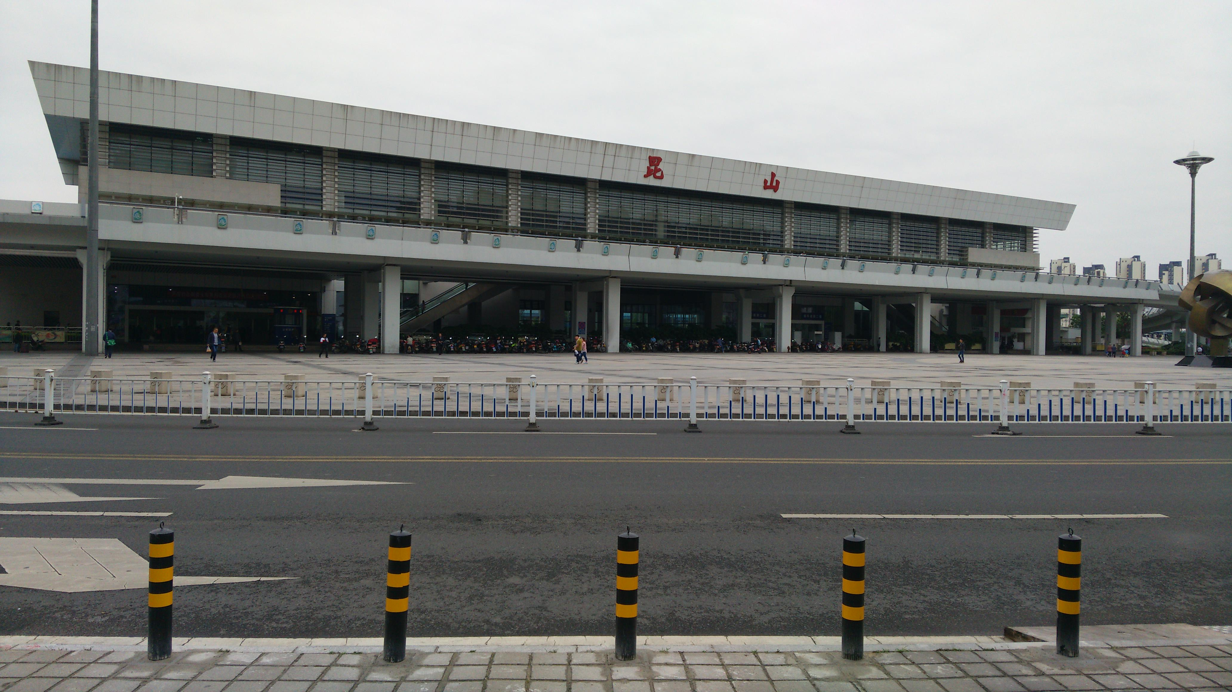 Kunshan, Suzhou, Jiangsu, China